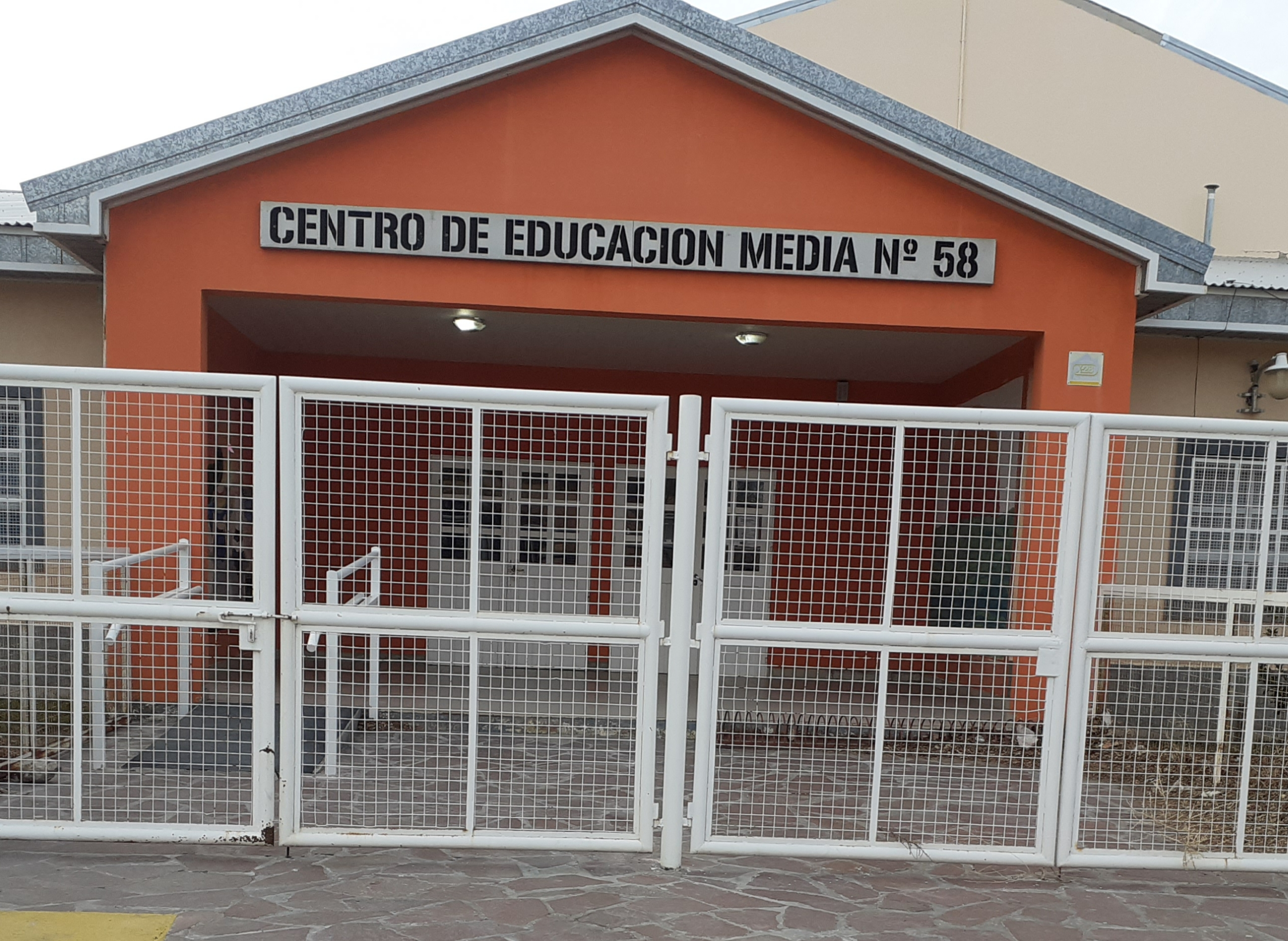 Escuela Secundaria Río Negro